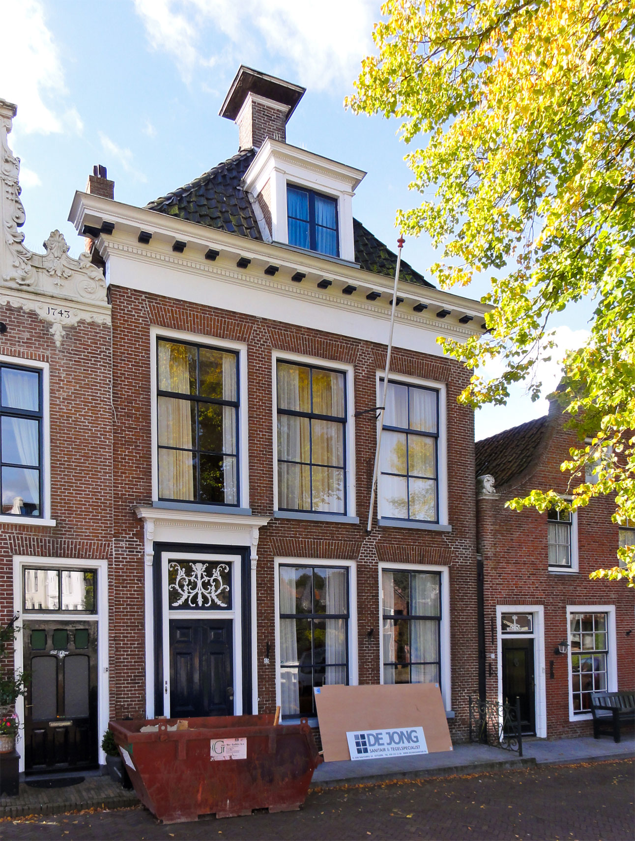 Vleesmarkt 35 Dokkum, rijksmonument